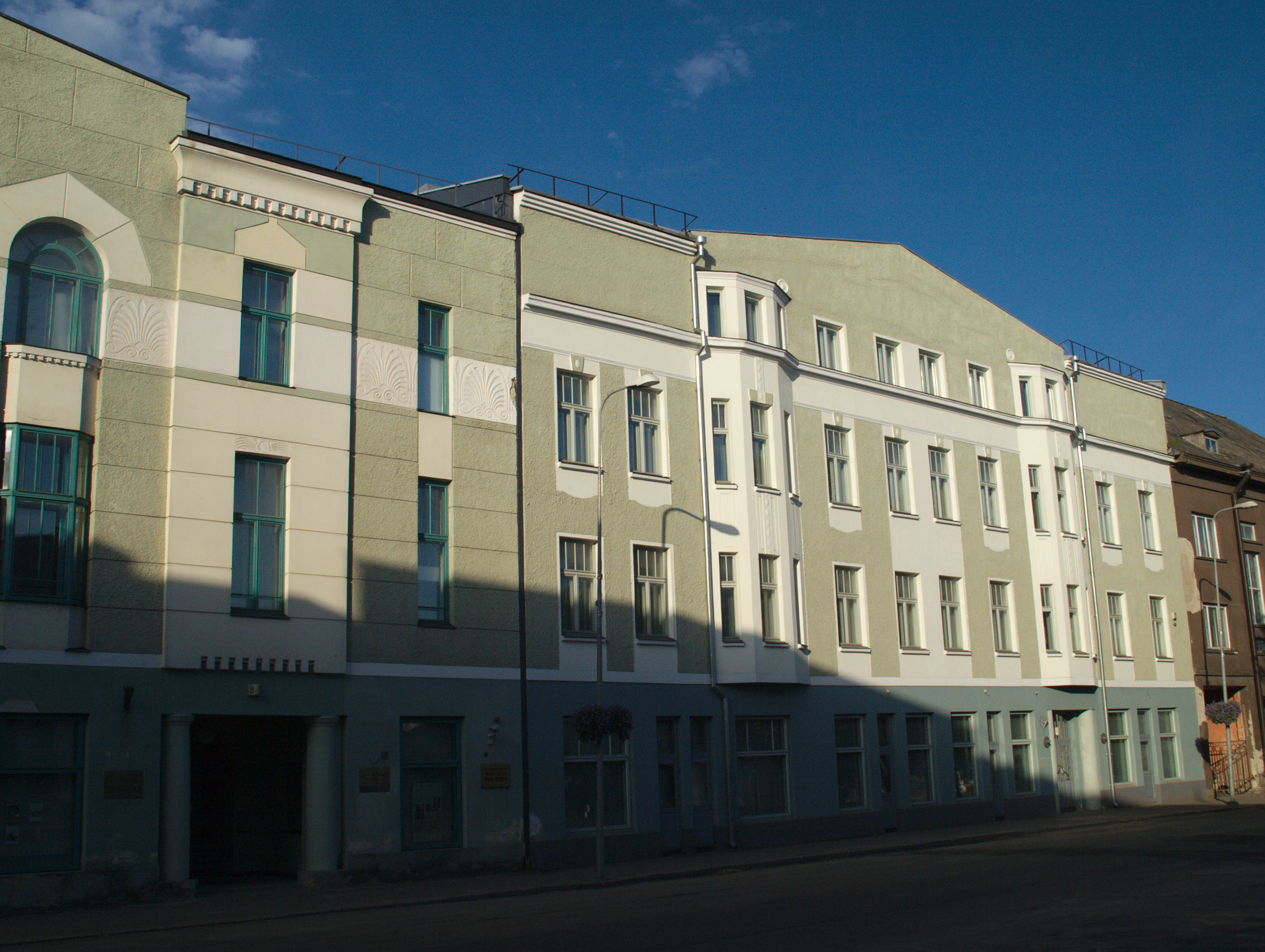 Valga Säde Seltsimaja